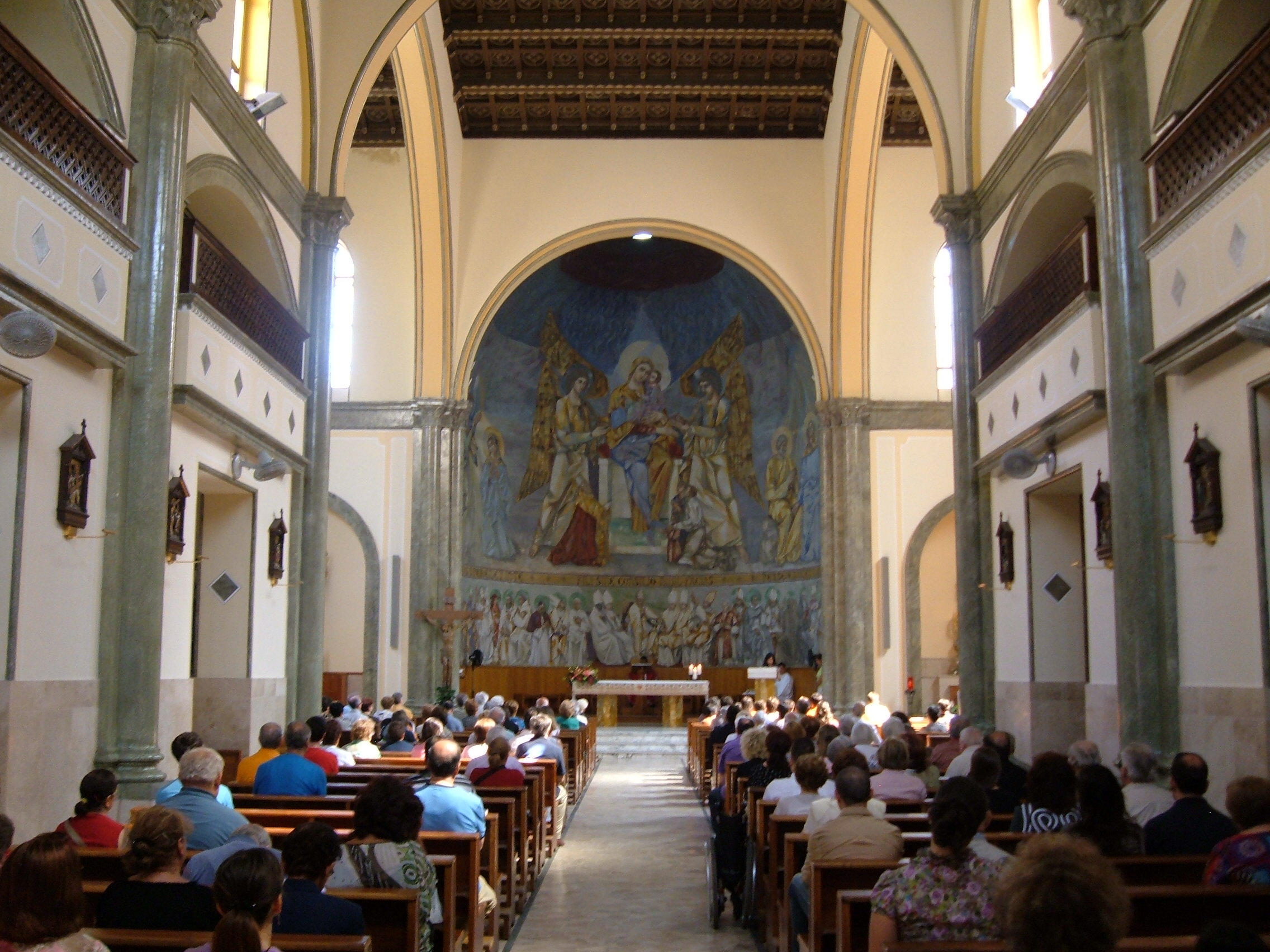 Chiesa di Santa Maria del Buon Consiglio, a Roma, nel quartiere Tuscolano.